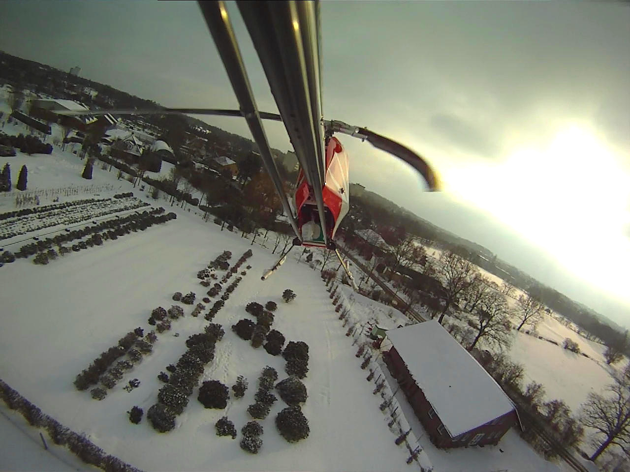 Onboard-Kamera auf einem TDR-RC-Helikopter